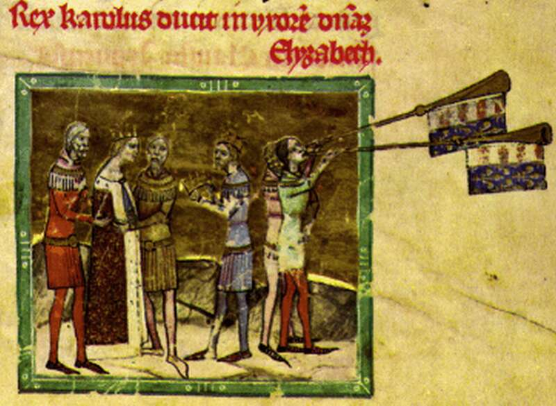 Miniatúra a XIV. századi Képes Krónikából